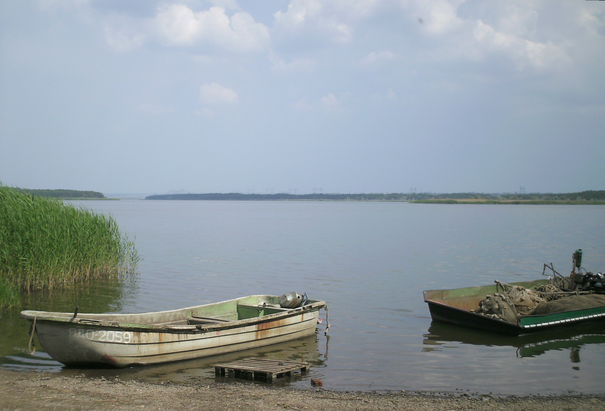 Клебан-Бицьке водосховище, Донецька область